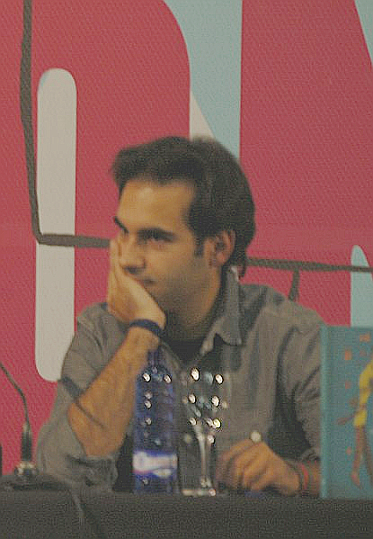 Pinto e Chinto no Culturgal 2010